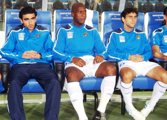 Вагиф Джавадов, Эрнани Перейра и Лэандро Гомеш (Сборная Азербайджана)